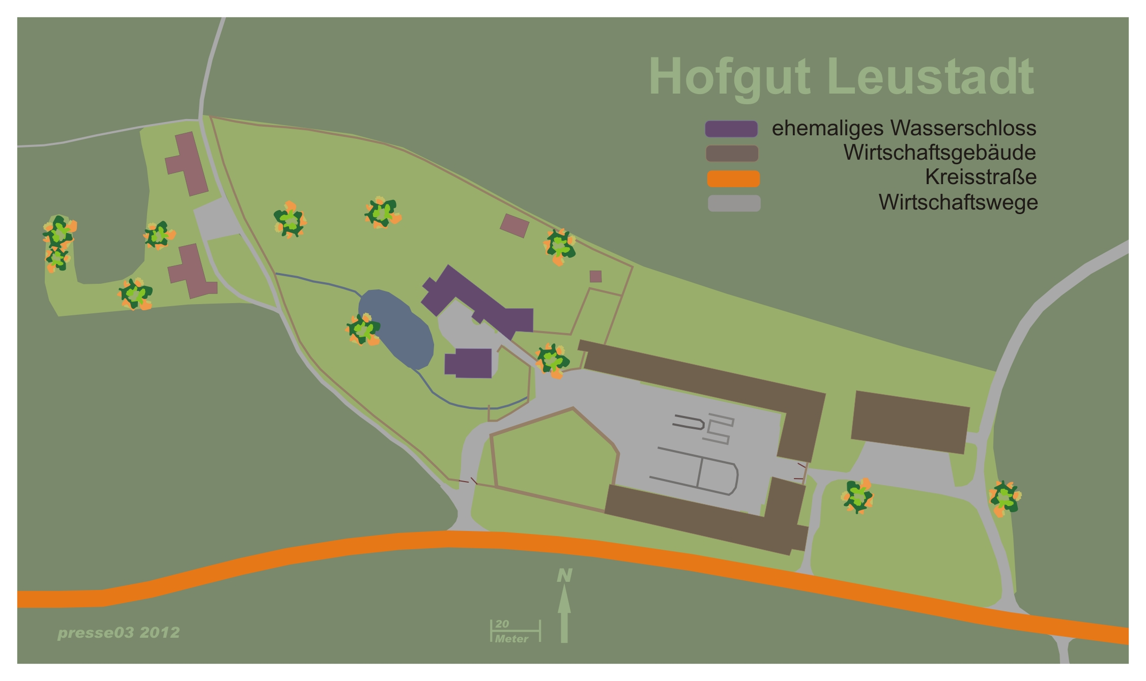 Plan des Hofguts Leustadt in Glauburg-Stockstadt, Hessen, Deutschland